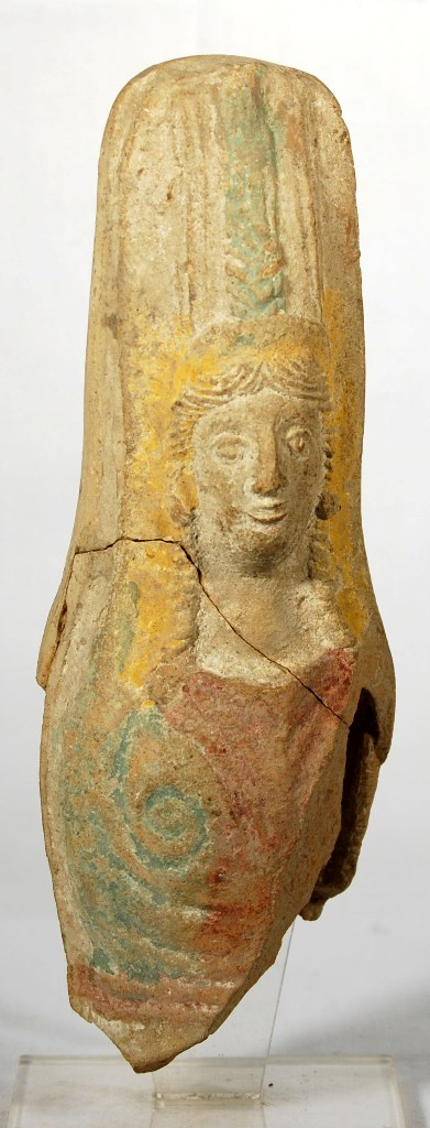 Diosa Isis egipcia de época ptolomáica, Siglos IV-I aC. Terracota policromada